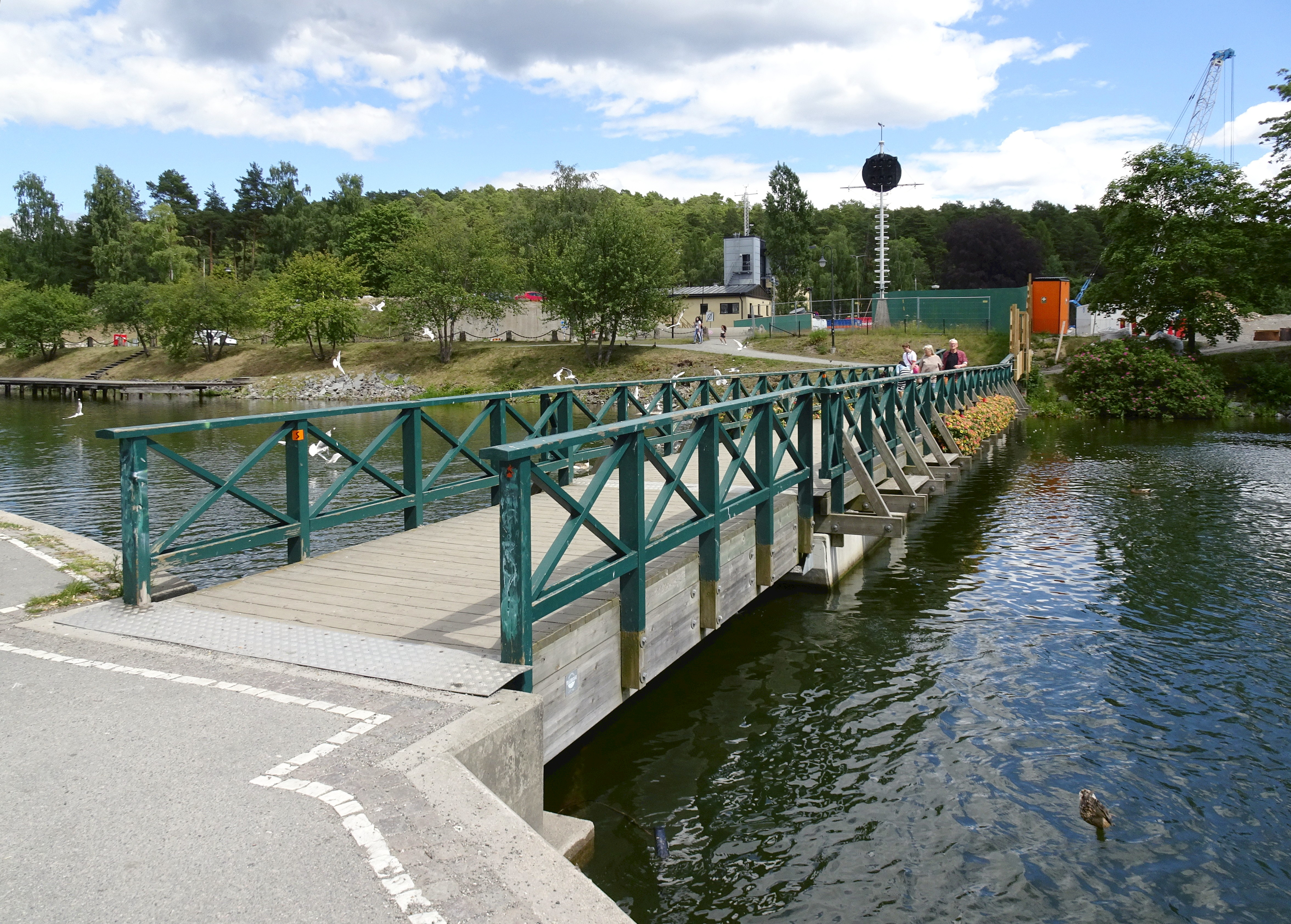 Marenbron